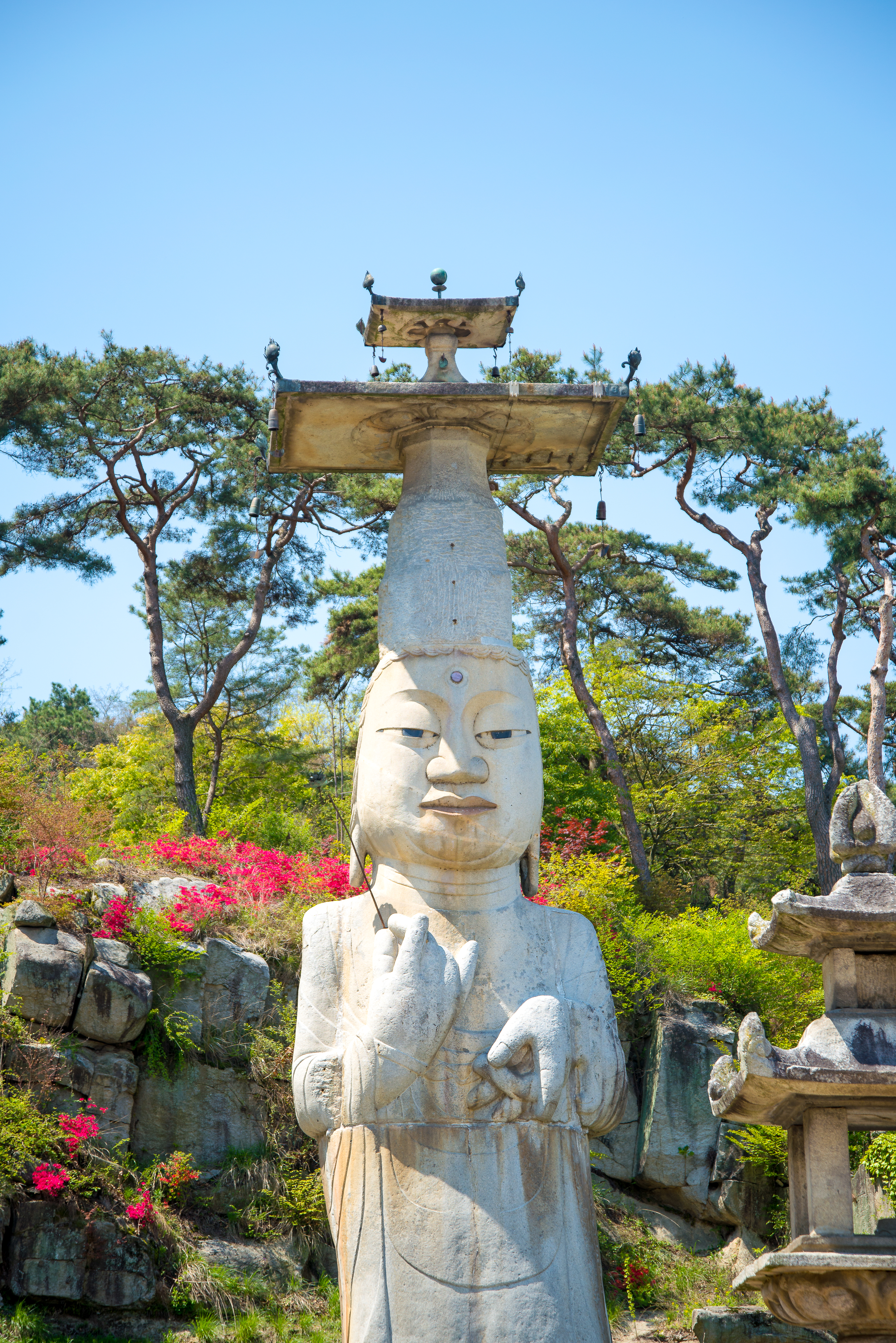 관촉사 석조미륵보살입상